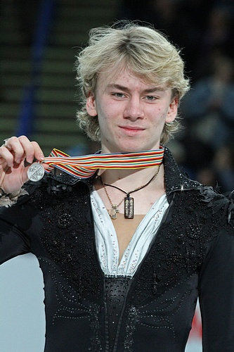 Артур Гачинский с серебряной медалью чемпионата Европы по фигурному катанию 2012